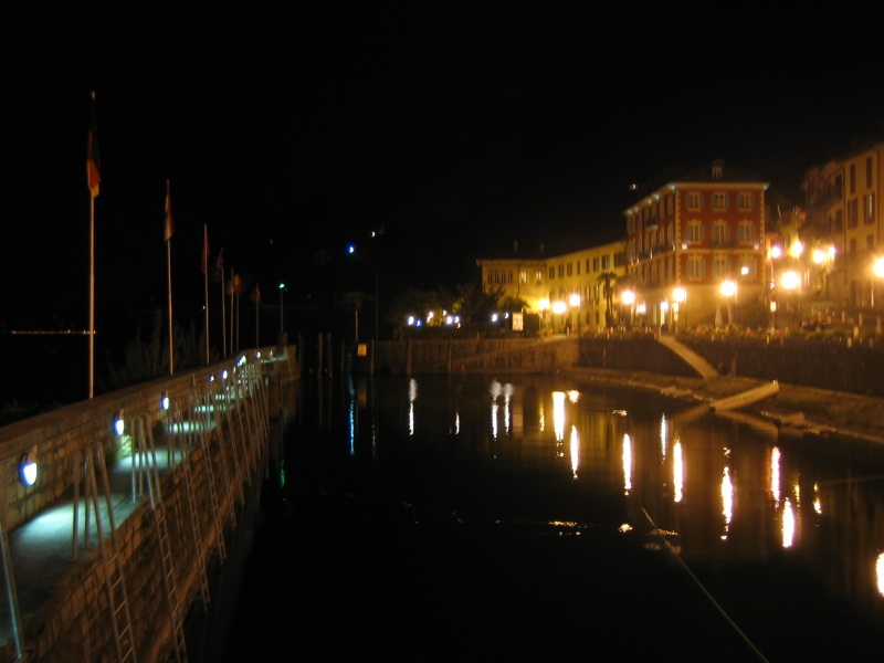 Cannobio, Piemonte, Italia